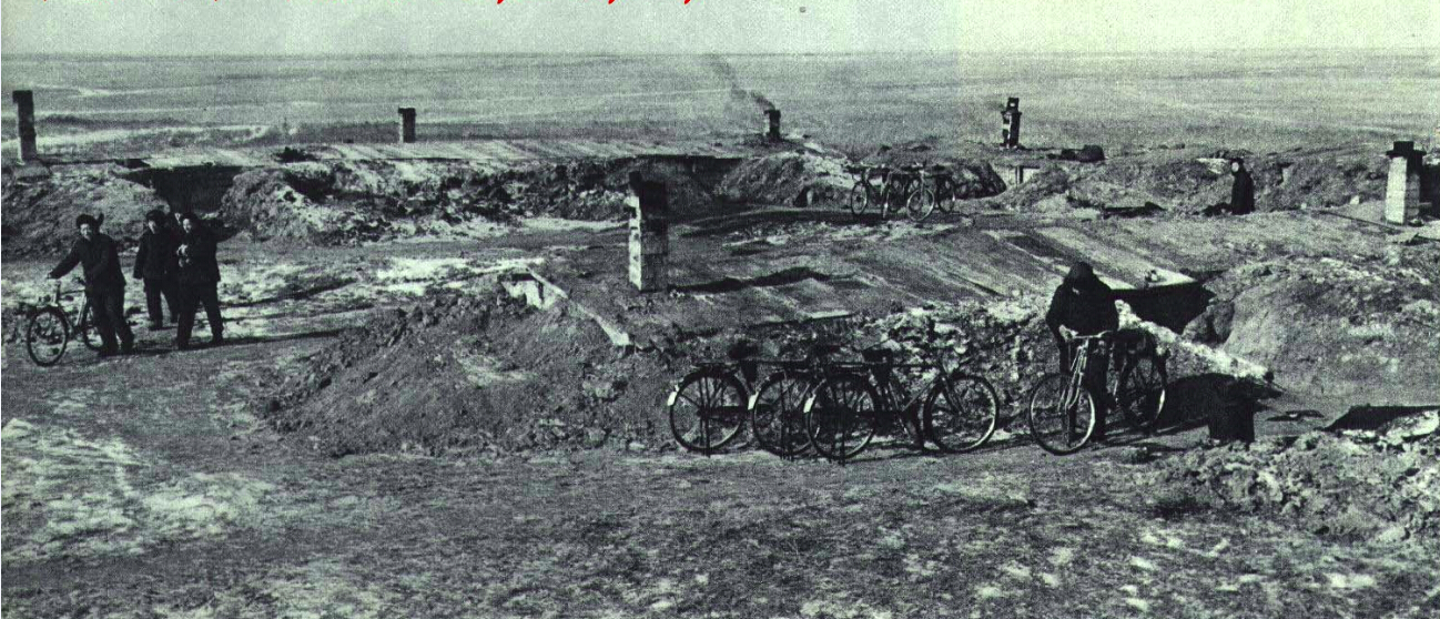 1966-07 1960年大庆人打地洞住